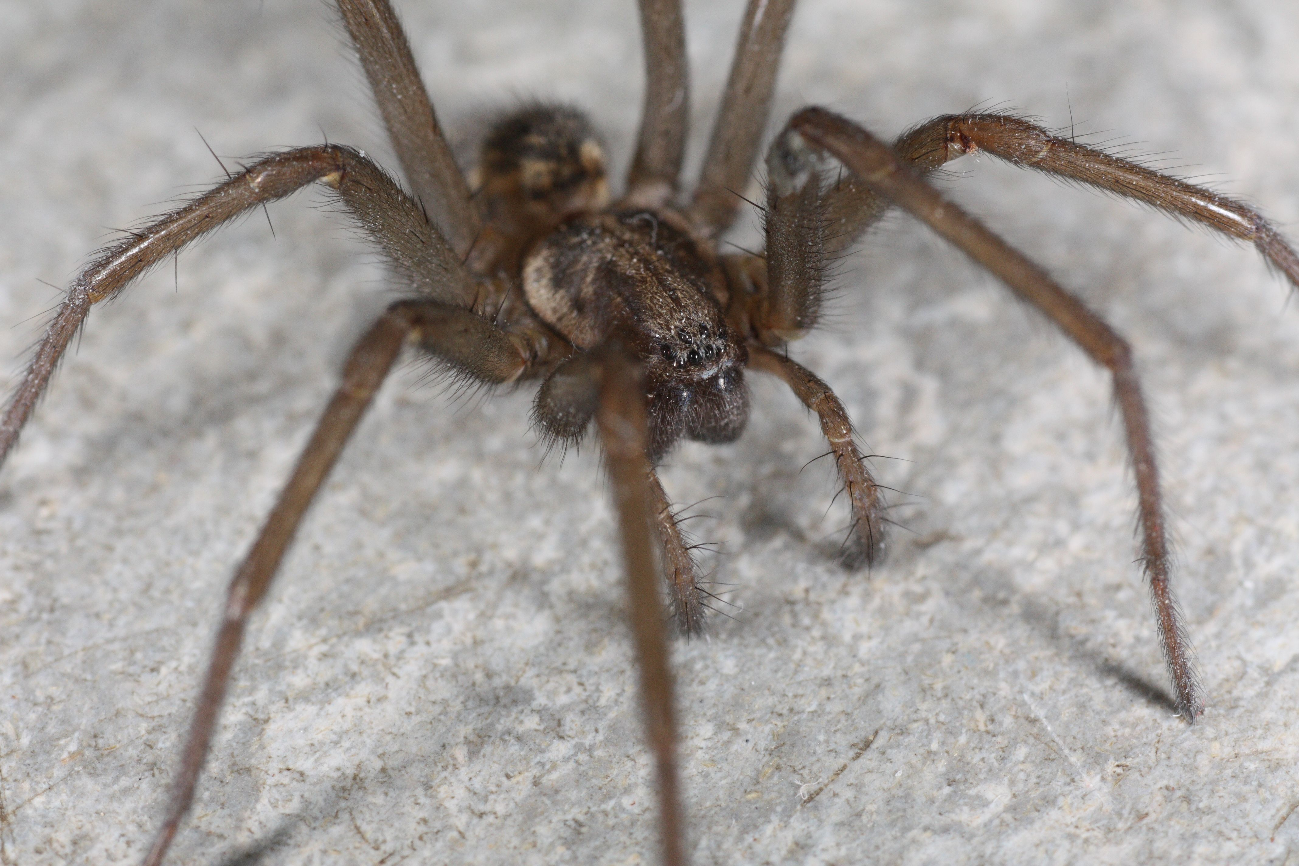 Voksen hunn av stor husedderkopp Tegenaria atrica fra siden. Et godt kjennetegn er lyse, lange ben uten mørkere ringer.